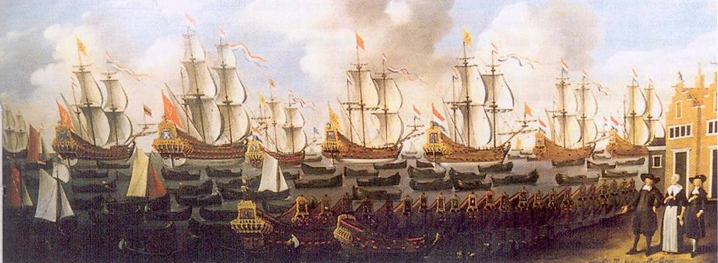 Scheepsbouwer J.M. Osterlingh toont de door hem in Edam gebouwde schepen aan zijn dochter en schoonzoon Tjerk Lolckes